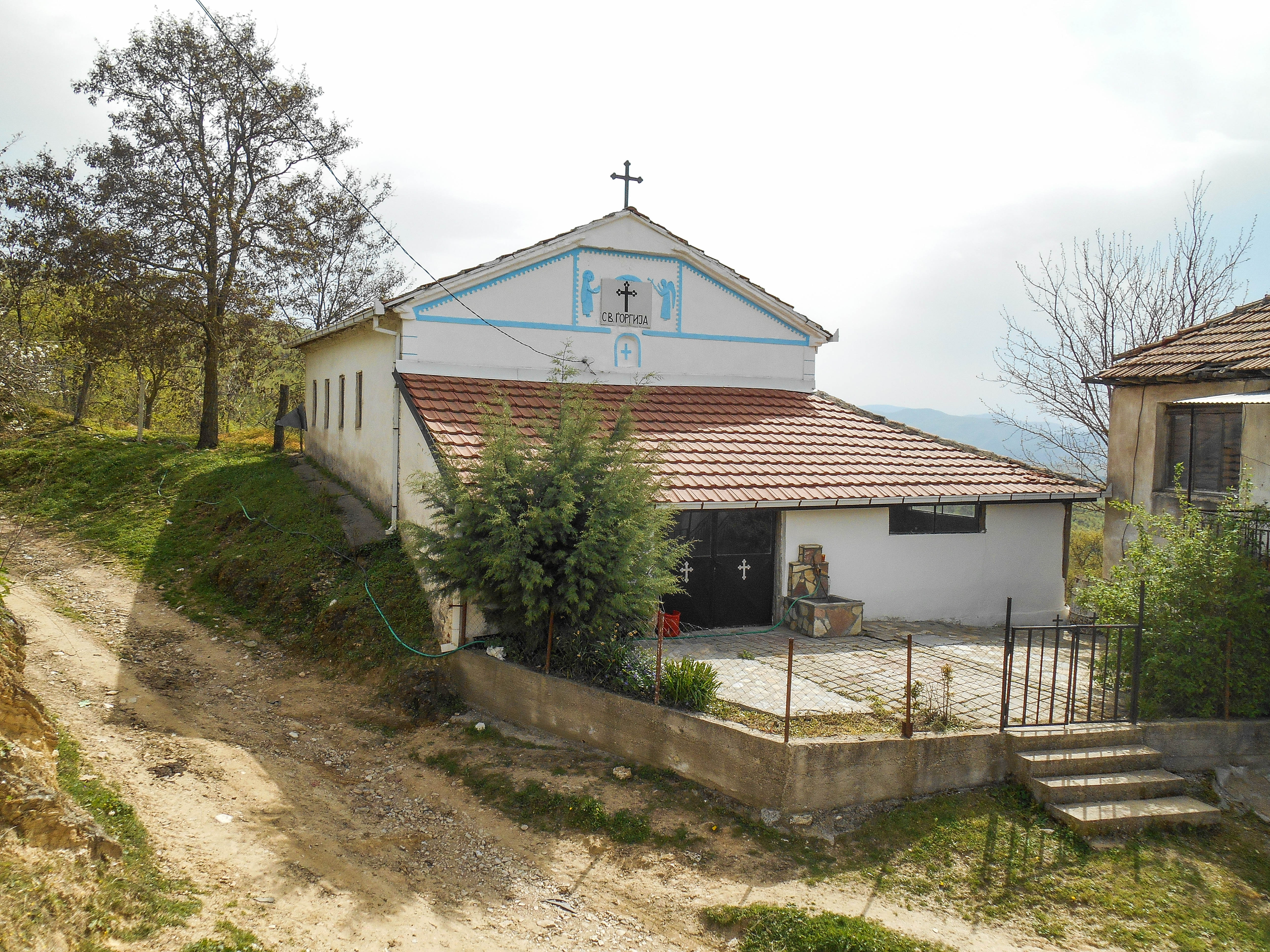 Црква Свети Ѓорѓи